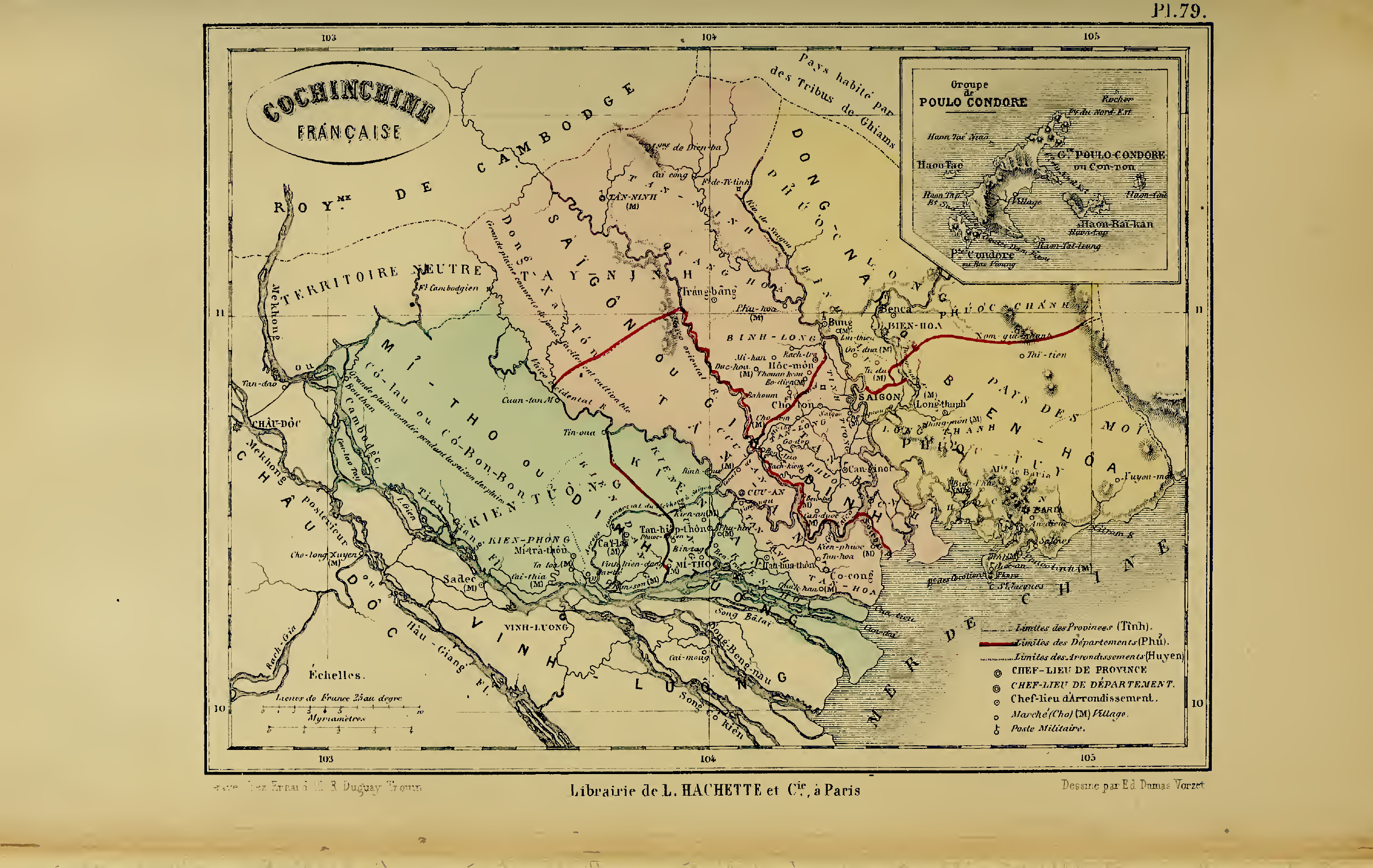 Illustration de l'Atlas universel de Bouillet